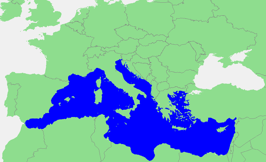 Locatie Middellandse Zee